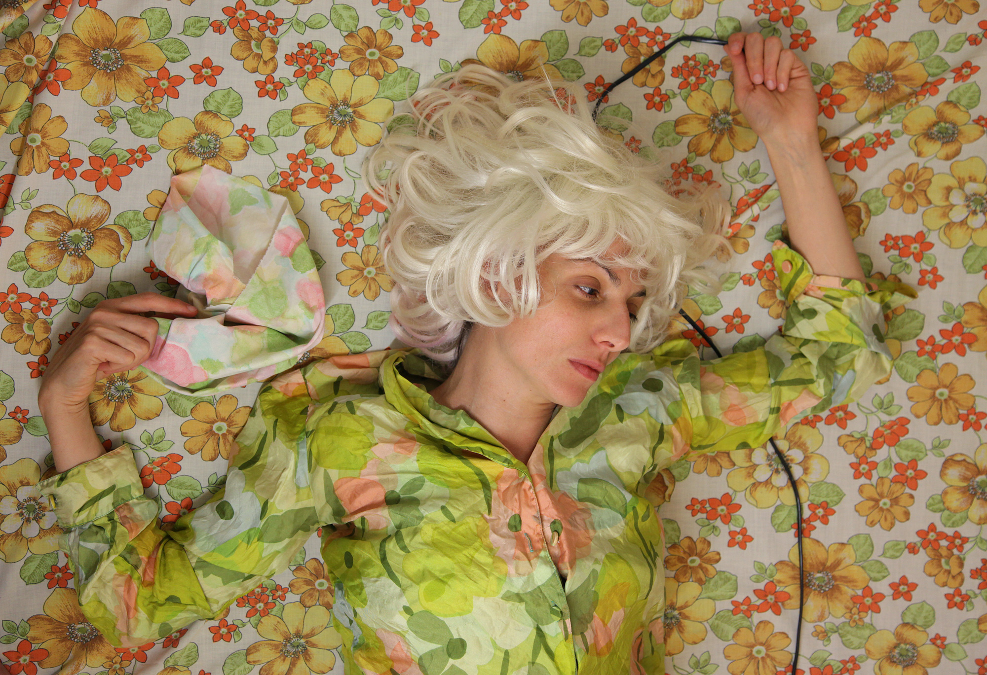 מיכל ויינברג כסבינה זאובר בהצגה "מיין ג'רוזלם" בתיאטרון תמונע